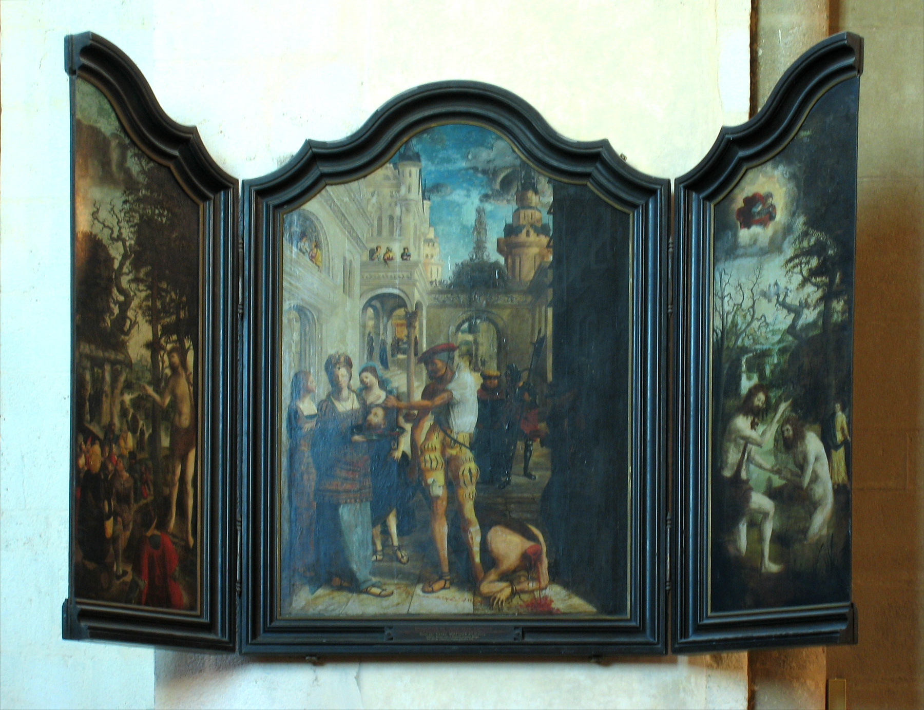 Triptyque de Saint-Jean-Baptiste par Pierre Aertzen (1503-1573) en la cathédrale de la Sainte-Trinité de Laval (53).